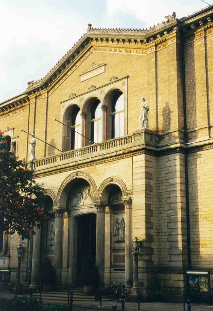 Karlsruhe: Kunsthalle, 1837-46 erbaut von Heinrich Hübsch. Im Bild der Haupteingang (Mittelrisalit).